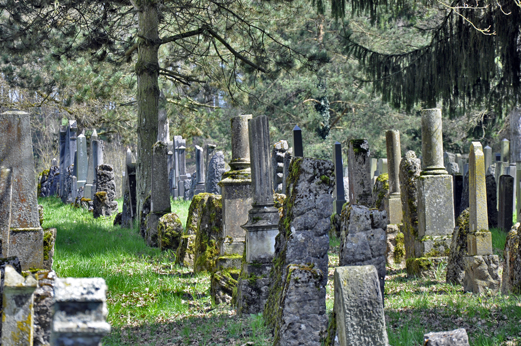 Historischer jüdischer Friedhof in Endingen, Aargau